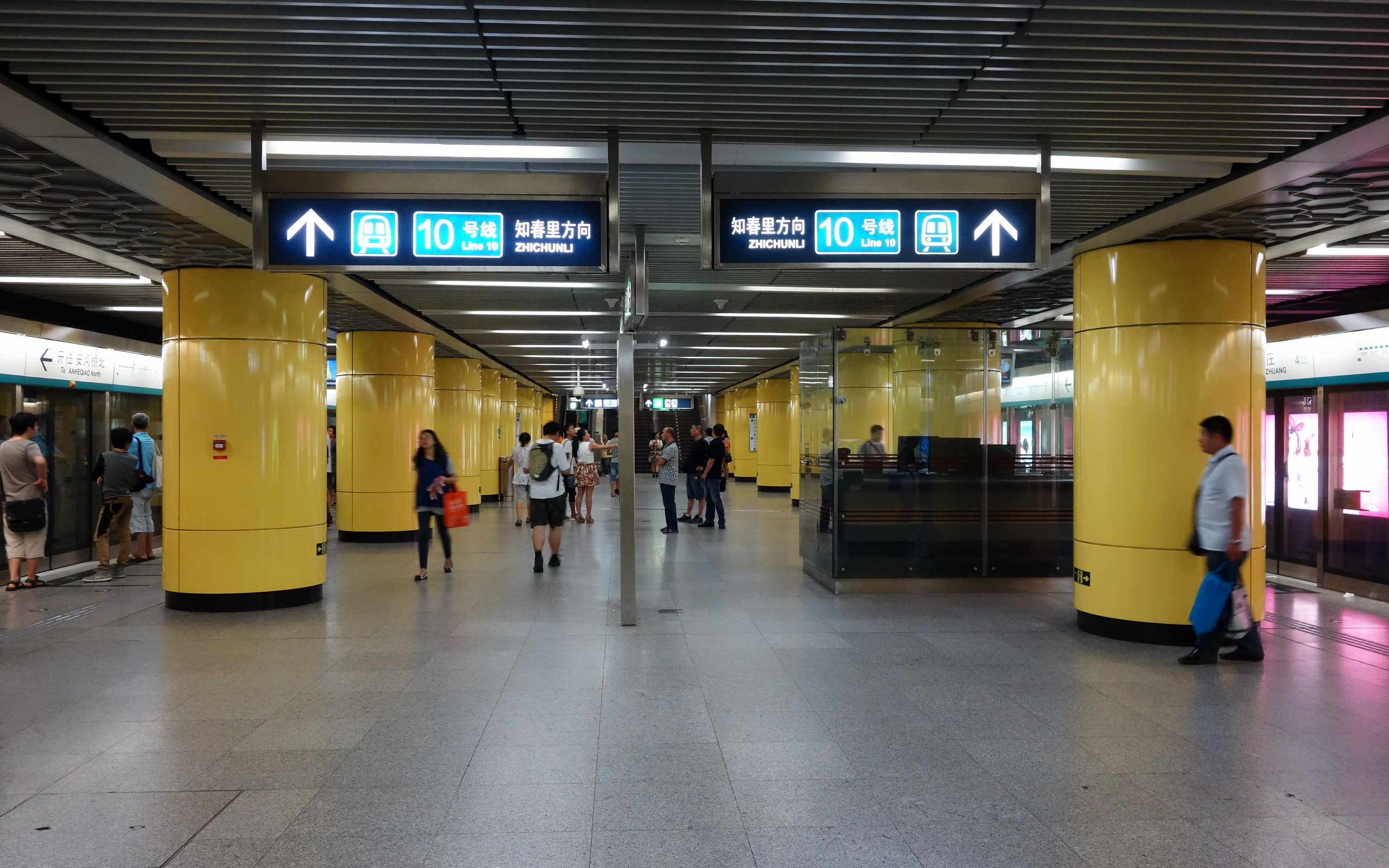 北京地铁4号线海淀黄庄车站站台。